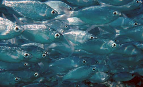 Hawaiian flagtail (Kuhlia sandvicensis)